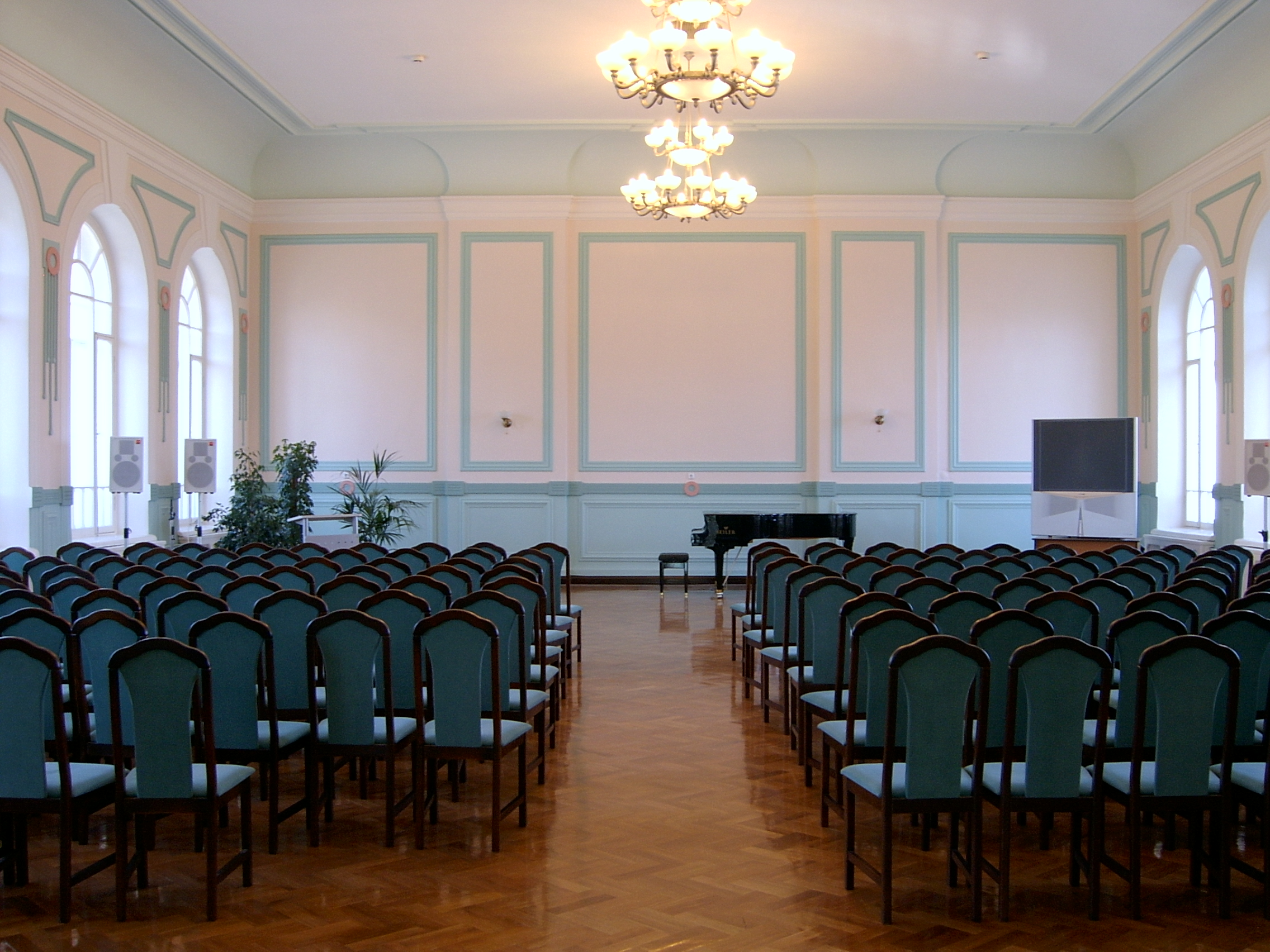 Description Большой зал Вологодской областной библиотекиDate 12 August 2011Source сфотографировал самAuthor User:ISC Большой зал Вологодской областной библиотеки